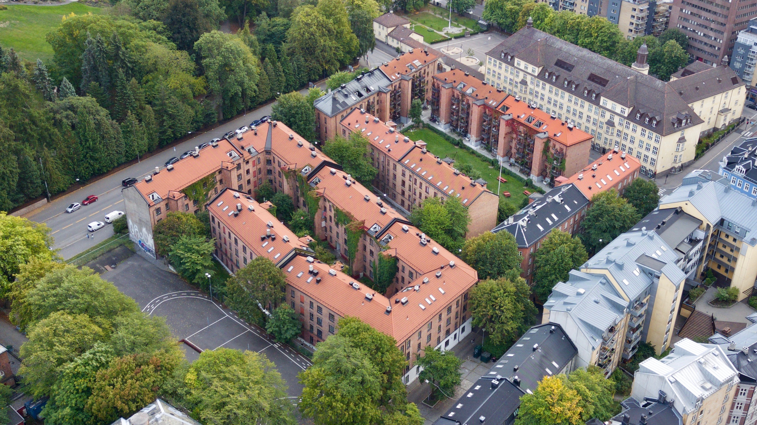 Gråbeingårdene. Tøyen i Oslo.